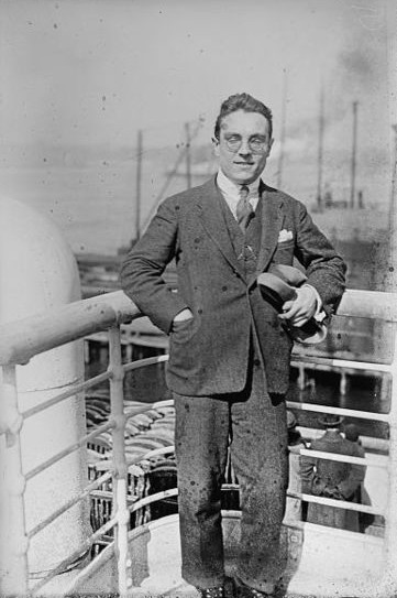 Emil Telmányi (1890-1988), Hungarian violinist